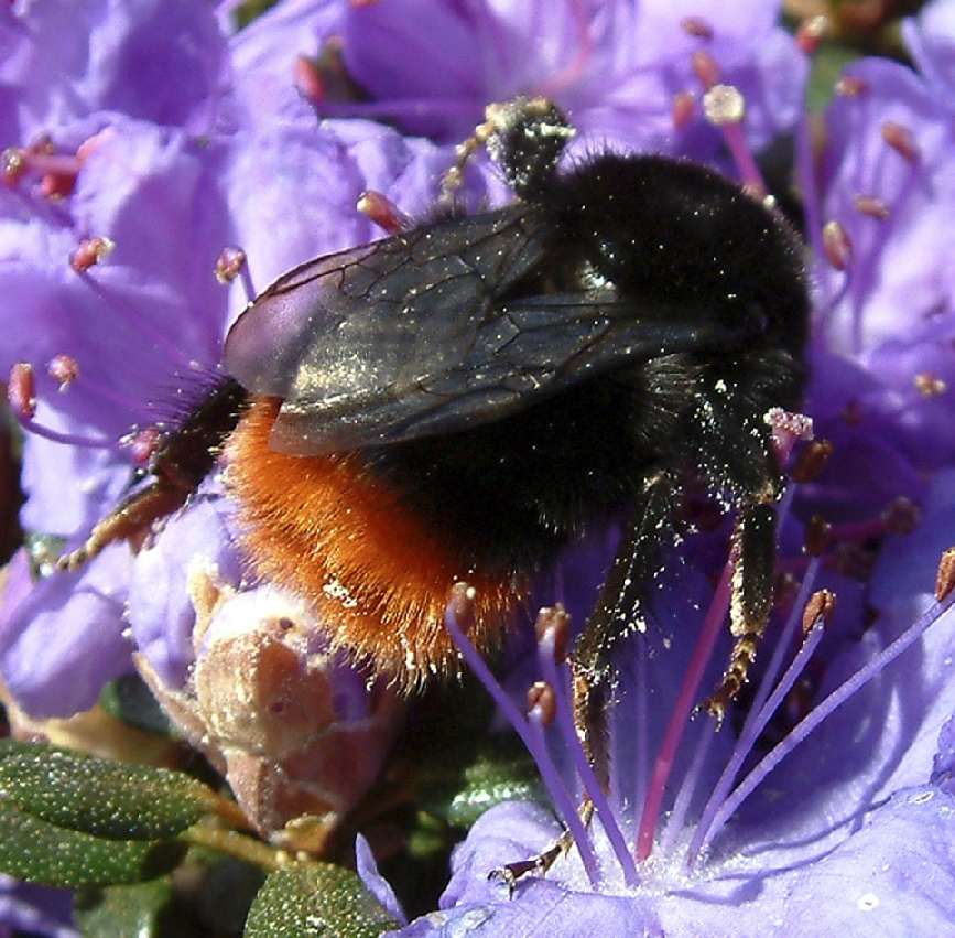 Bombus lapidarius